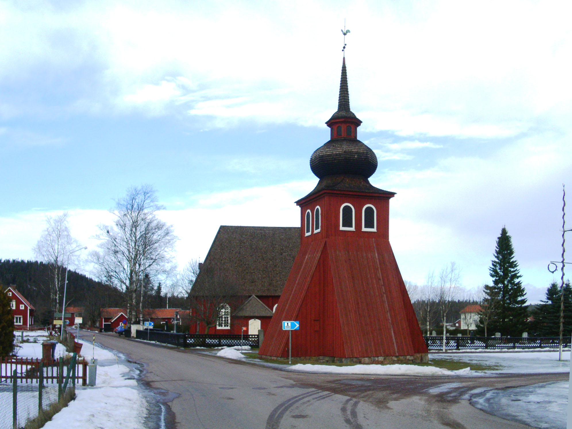 Norr Amsberg vid Amsbergs kapell, Borlänge.